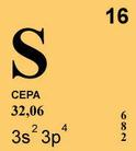 Күкірт